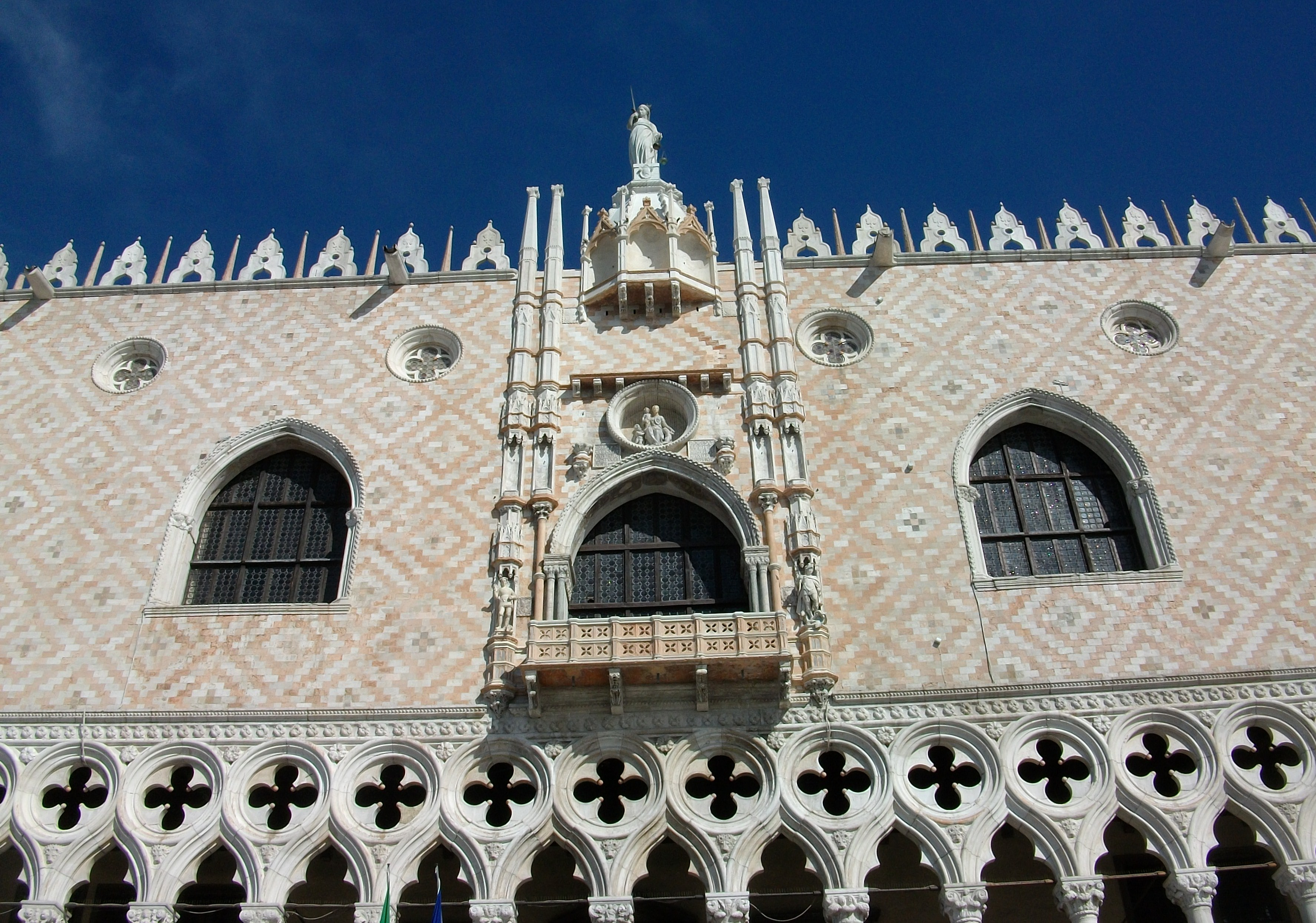 Façana i balcó del Palau Ducal, Venècia.